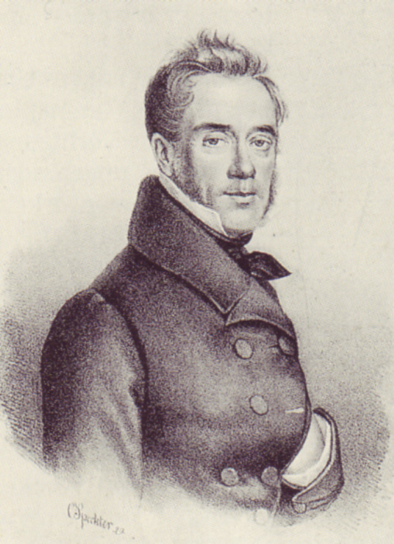 Robert Miles Sloman (1783-1867), Hamburger Reeder. Porträtzeichnung aus dem Jahre 1839.